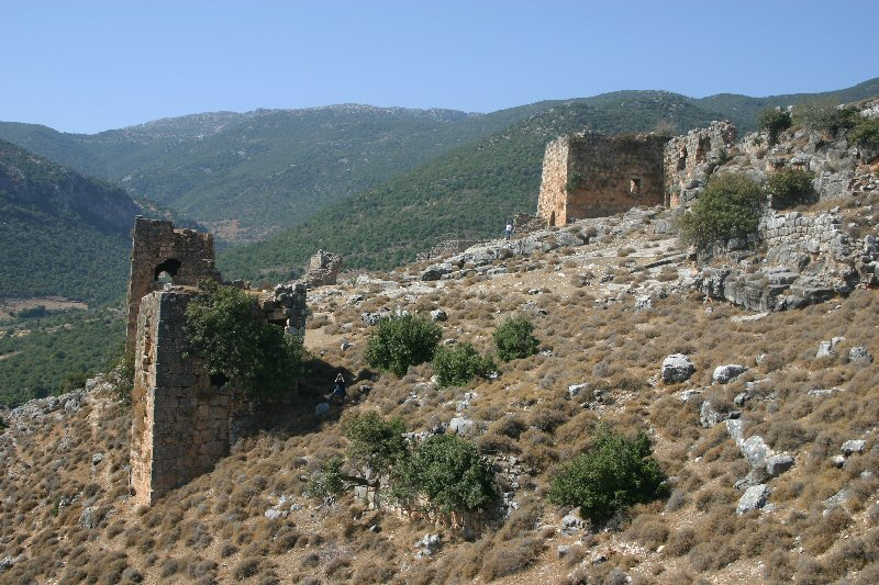 Bourzey Burg Fotograf: Mewes Quelle: eigenes Foto Datum: 2004 Lizenz: public domain Kategorie:Polarlys-Test